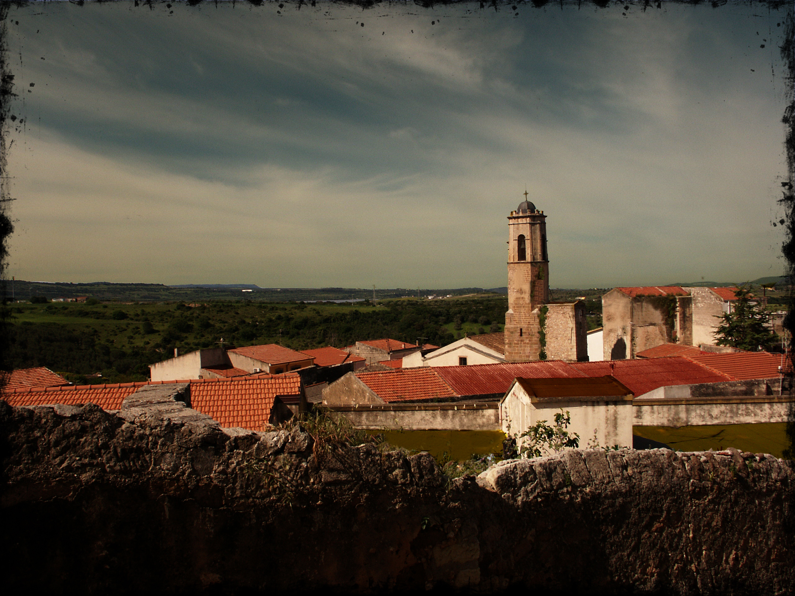 Panoramica di Uri di sera